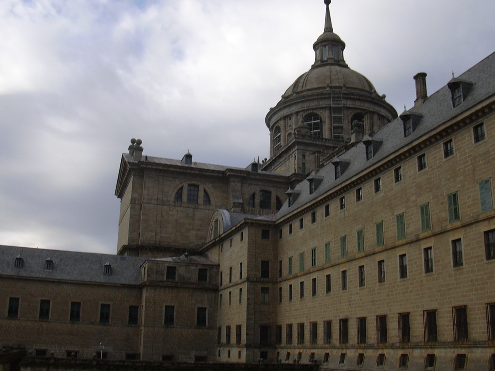 San Lorenzo de El Escorial, Madrid.